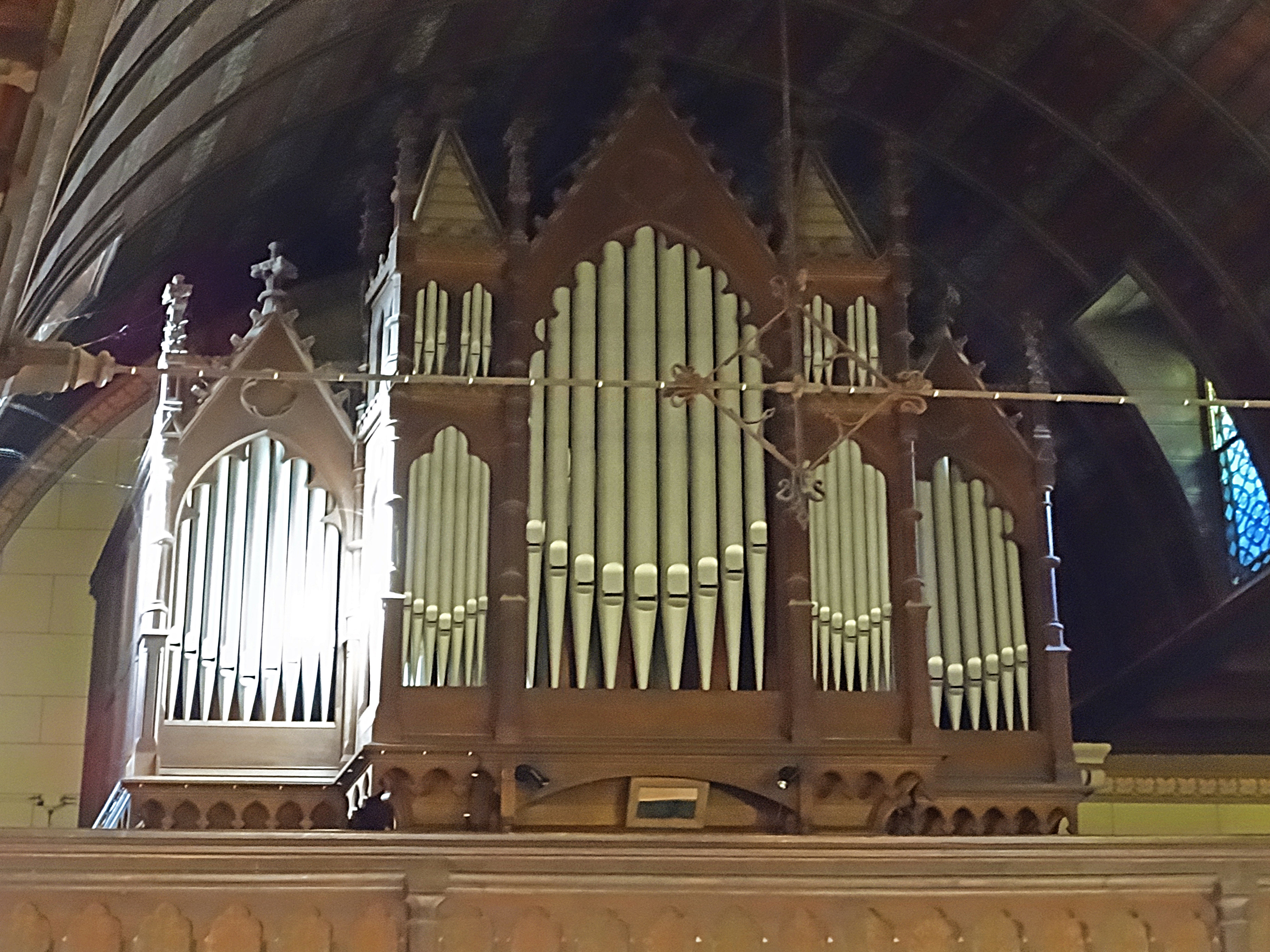 Orgel von Wilhelm Rühlmann (1889, Opus 96, IIP/25) in St. Gertrud (Neugattersleben)